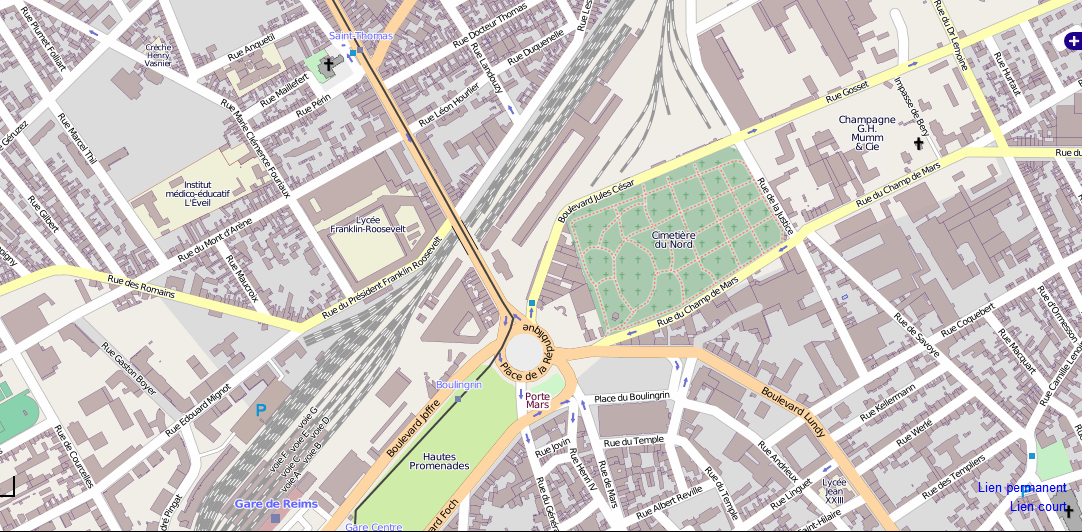 Localisation rue Hourlier à Reims This map may be incomplete, and may contain errors. Don't rely solely on it for navigation.